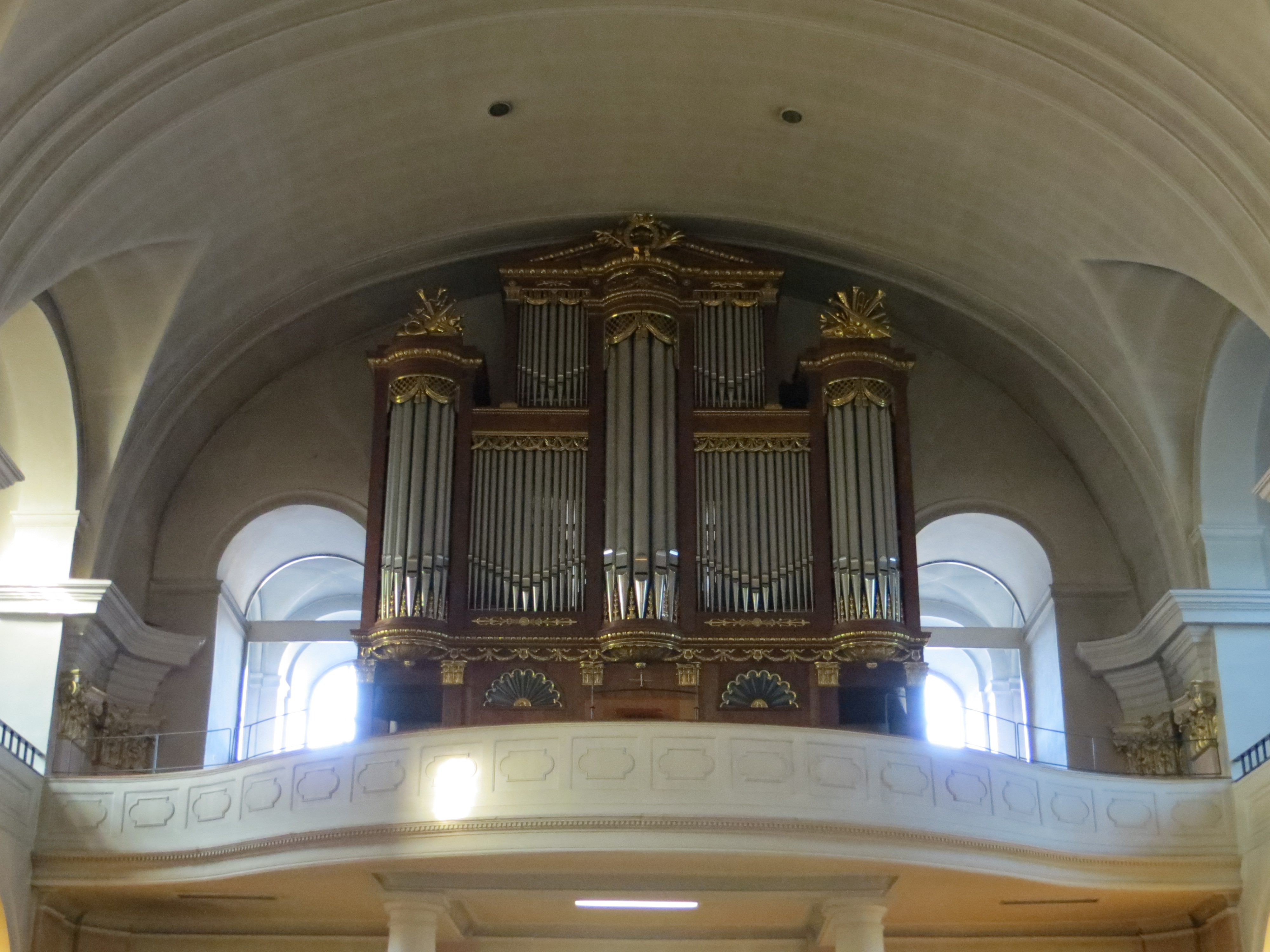 Stieffell-Orgel St. Alexander Rastatt